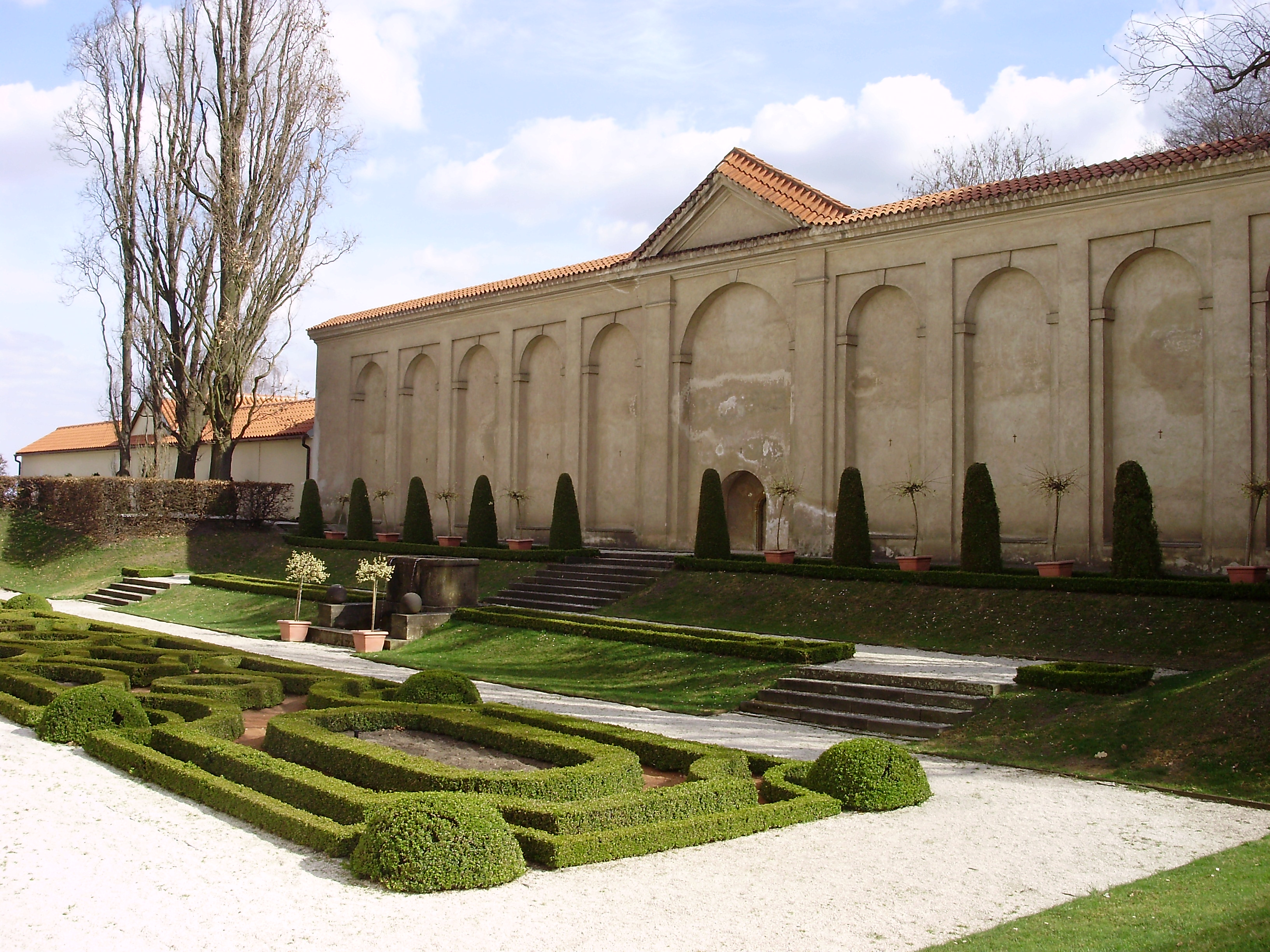 Konventní zahrada kláštera premonstrátů v Praze na Strahově.